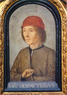 Johannes Despauterius (ca.1480-1520), Flemish humanist (Met toestemming uit brochure "De Denderende steden", Federatie voor toerisme in Oost-Vlaanderen - 1990)